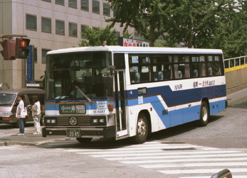 博多駅交通センター出口にて撮影